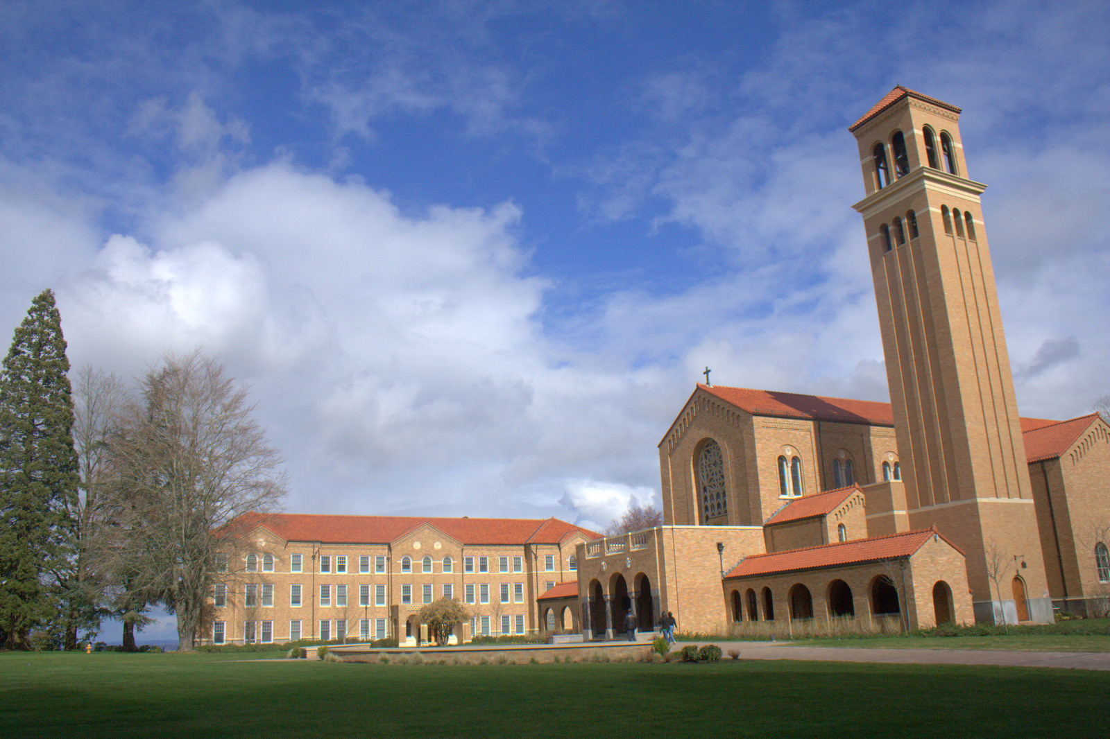 Abbey, Mt. Angel, Oregon